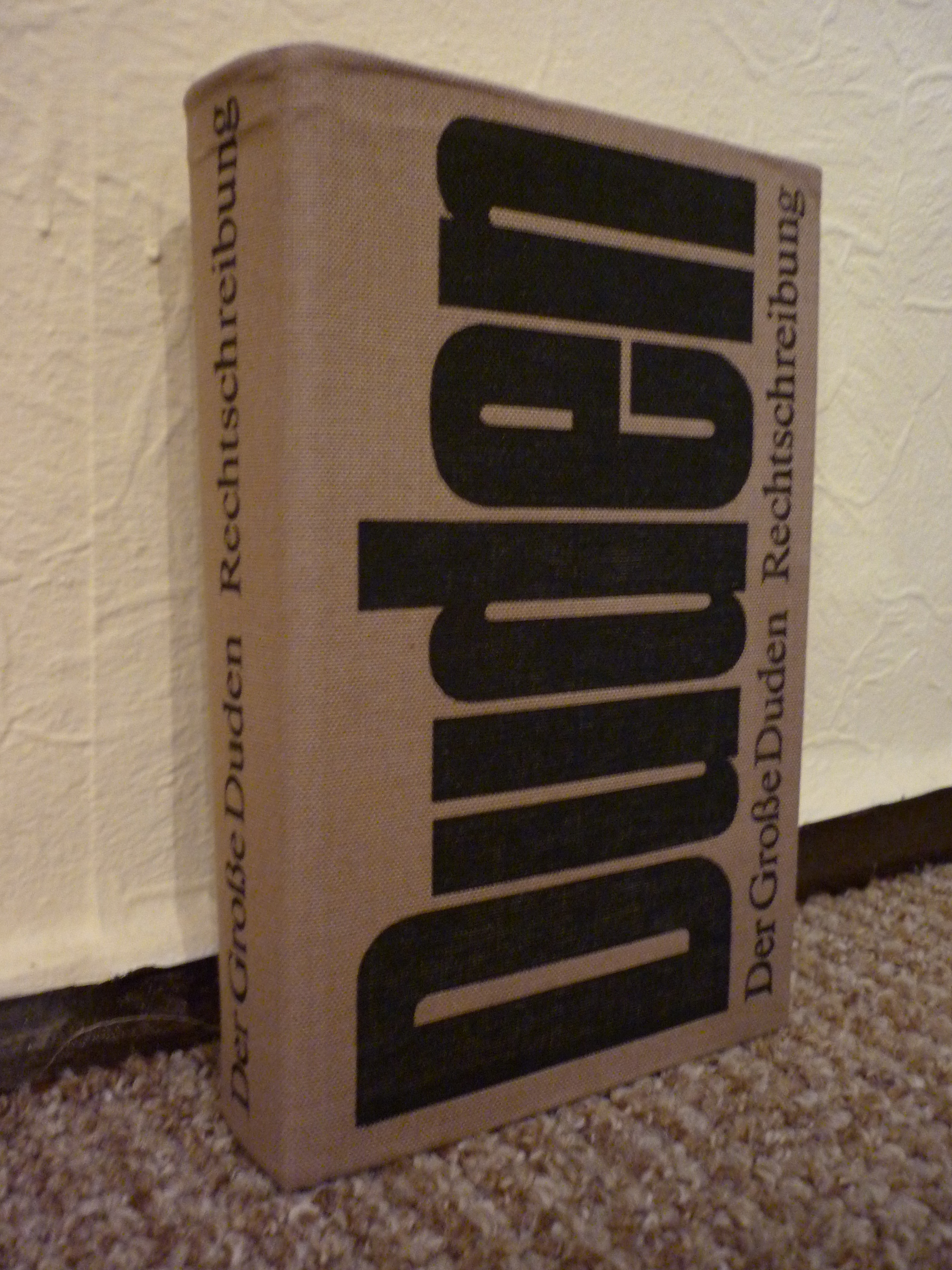 Duden von 1981 VEB Bibliographisches Institut Leipzig 22. Auflage